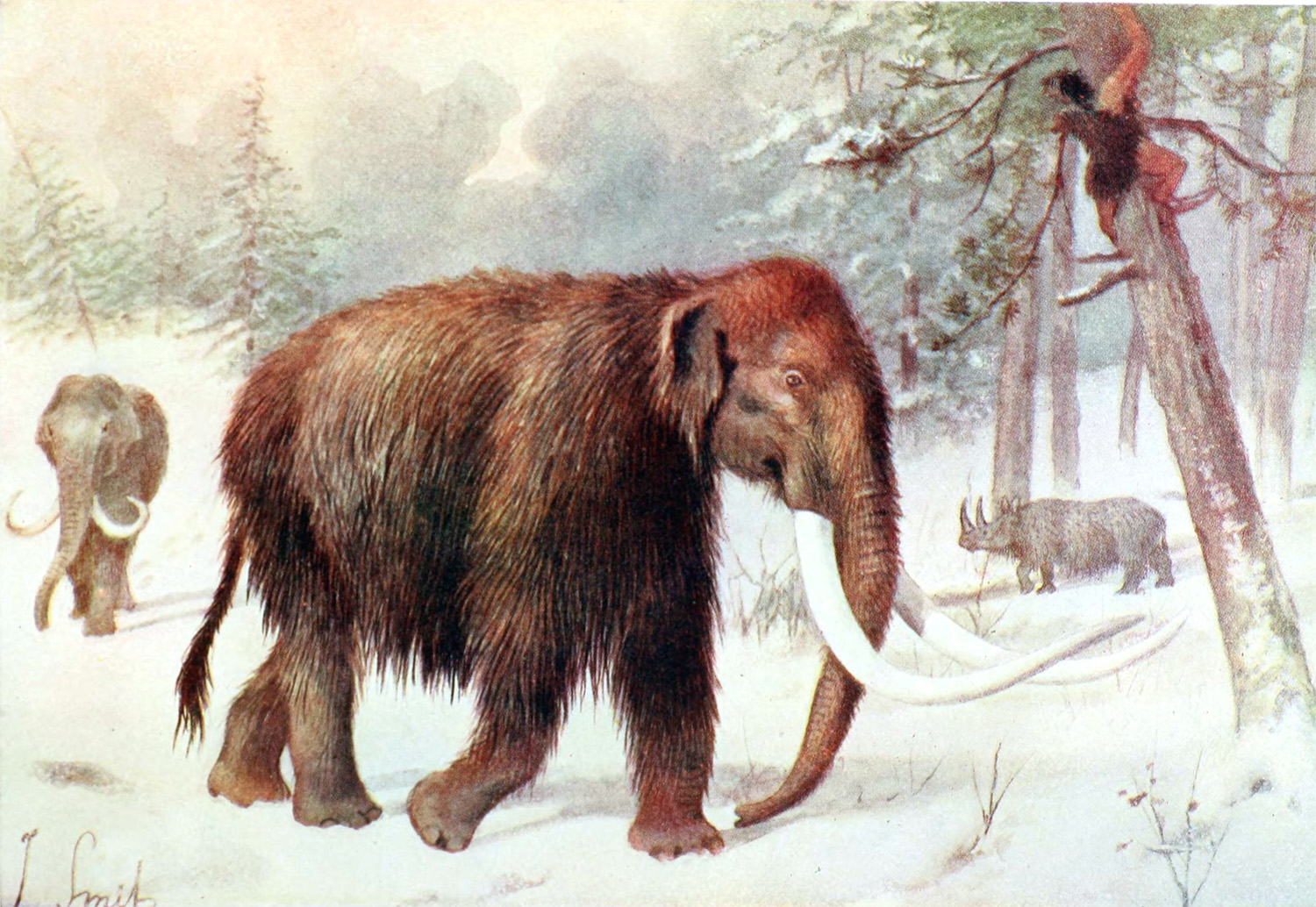 Mammuthus